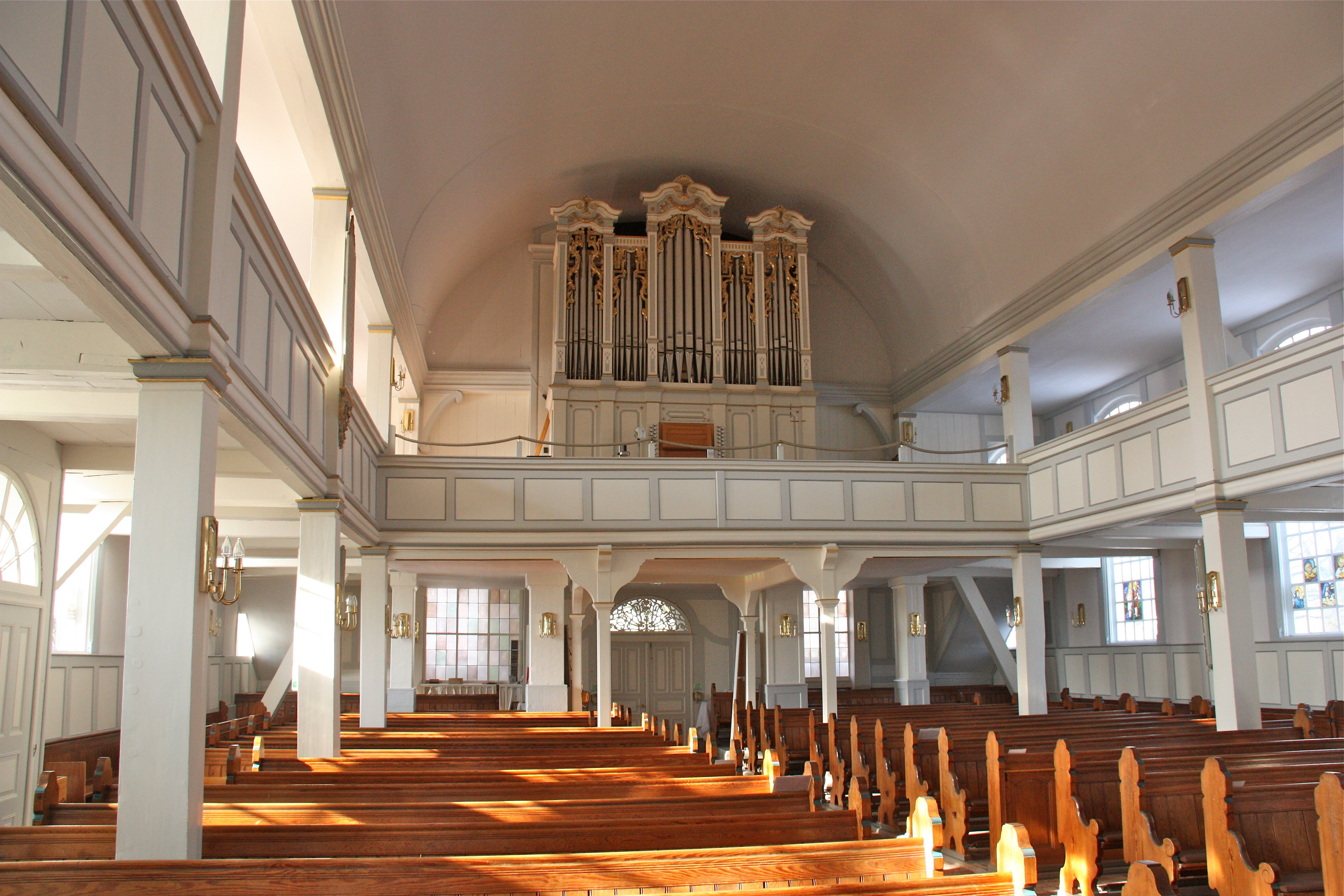 Hamburg, Nienstedtener Kirche, Innenraum mit Orgel, Orgelprospekt aus dem Jahre 1906, Orgel der Orgelbaufirma Mühleisen von 2001